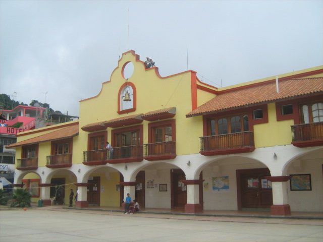 Palacio Municipal de Juquila (Santa Catarina Juquila), Oaxaca.